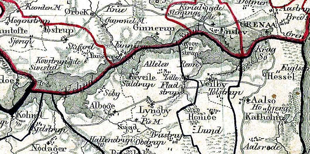 Kolindsund Randers Amt 1827, Danmark / Denmark.